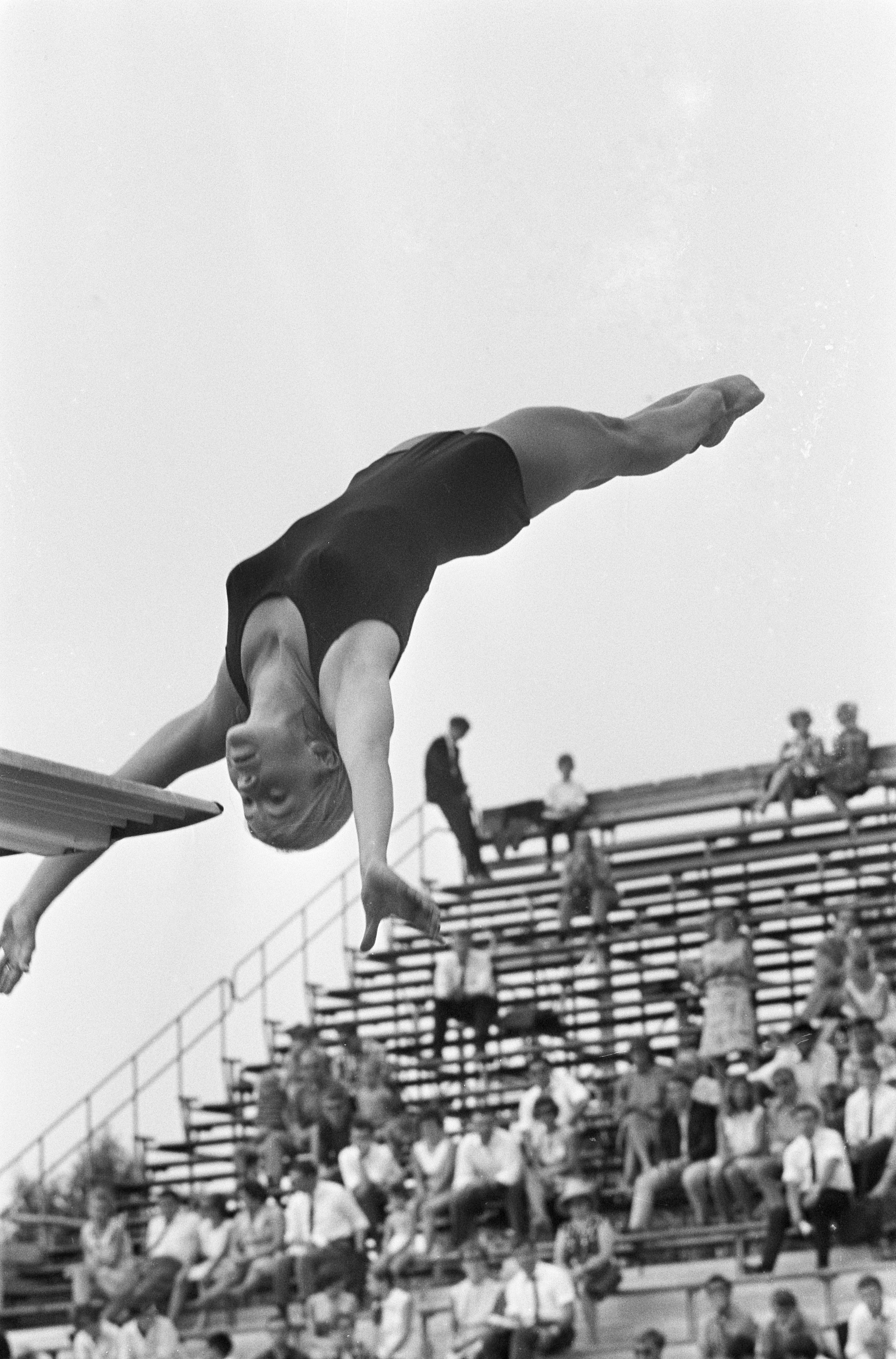 Collectie / Archief : Fotocollectie Anefo Reportage / Serie : [ onbekend ] Beschrijving : Europese Zwemkampioenschappen te Utrecht, schoonspringen Tamara Fedosova in aktie van drie meter plank Datum : 21 augustus 1966 Locatie : Utrecht Trefwoorden : SCHOONSPRINGEN, zwemkampioenschappen Fotograaf : Kroon, Ron / Anefo Auteursrechthebbende : Nationaal Archief Materiaalsoort : Negatief (zwart/wit) Nummer archiefinventaris : bekijk toegang 2.24.01.05 Bestanddeelnummer : 919-4720